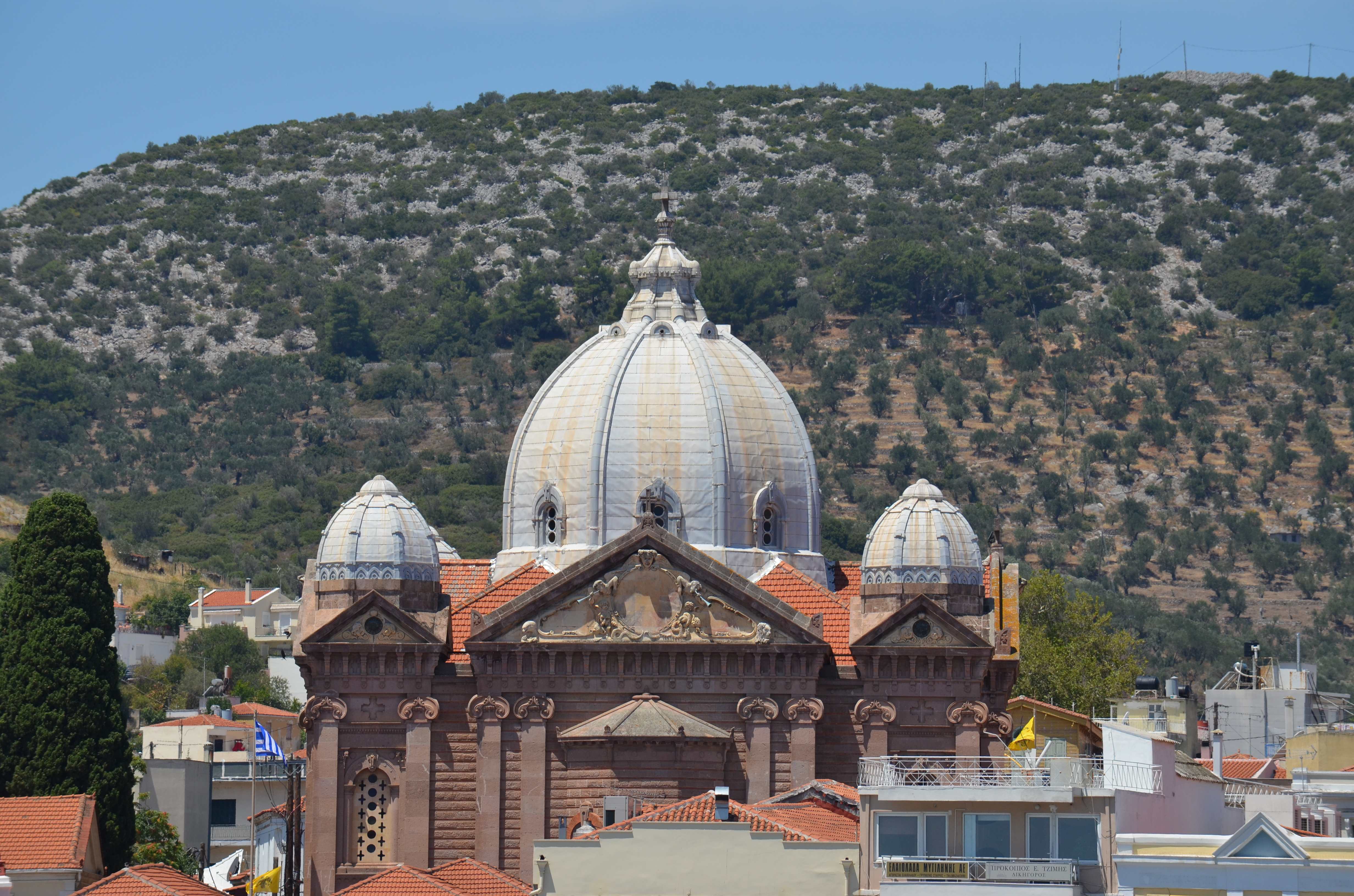 Die Agios Therapon Kirche in Lesbos: Hintere Seite mit Kuppeln